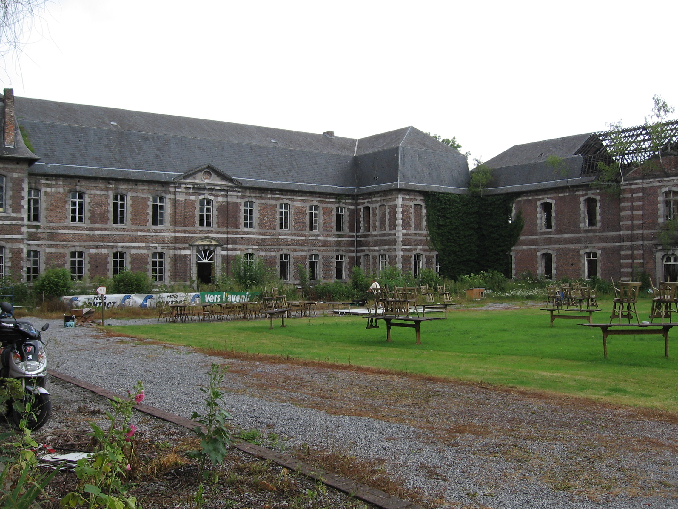 Cour intérieure de l'ancienne abbaye d'Oignies, Belgique